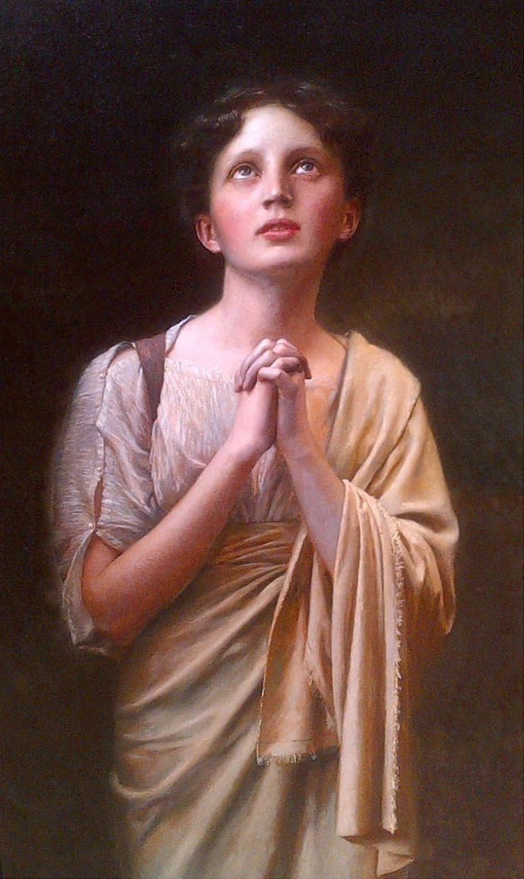 Originaltitel: Christin im Gebet